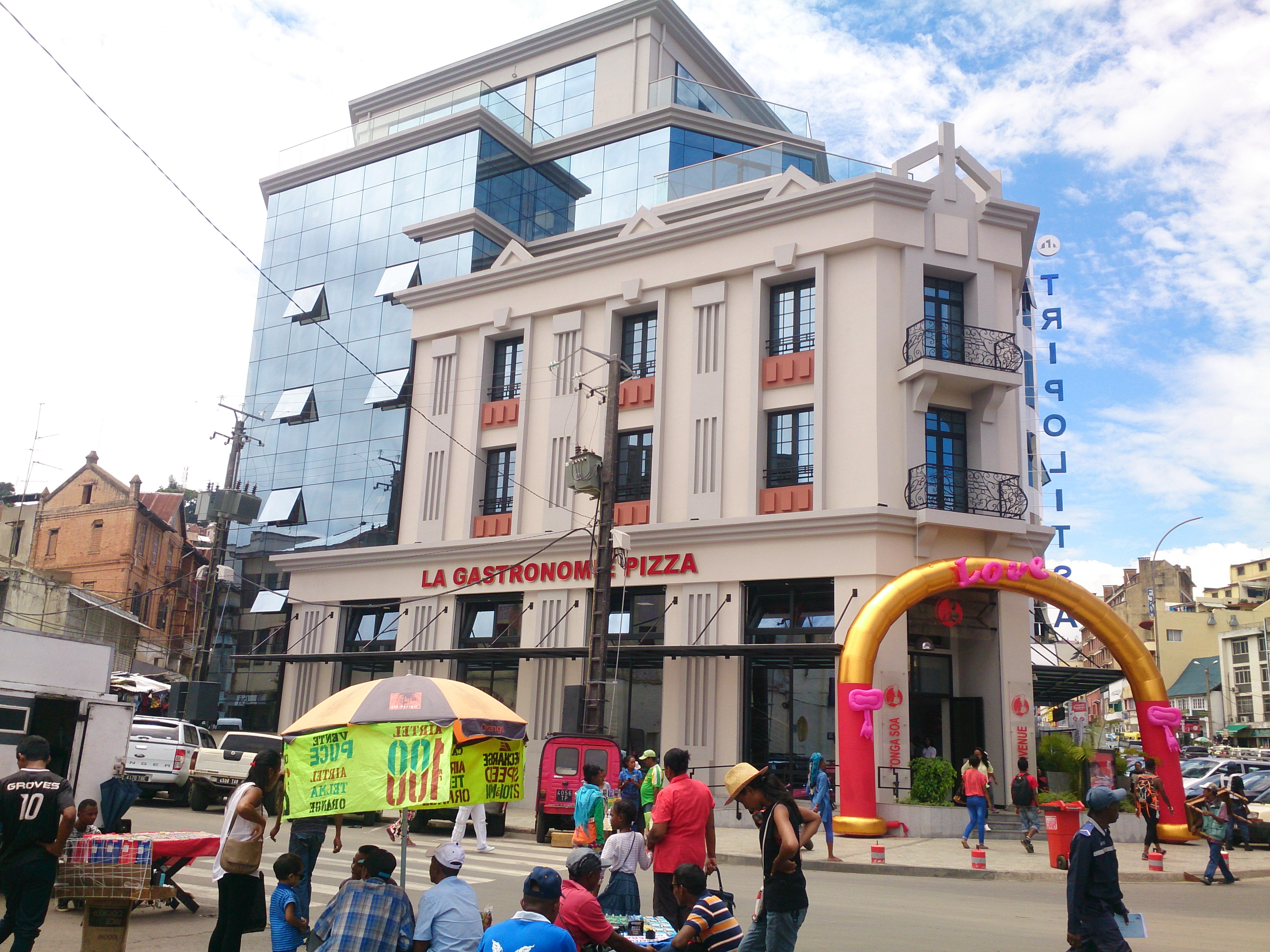 Antananarivo